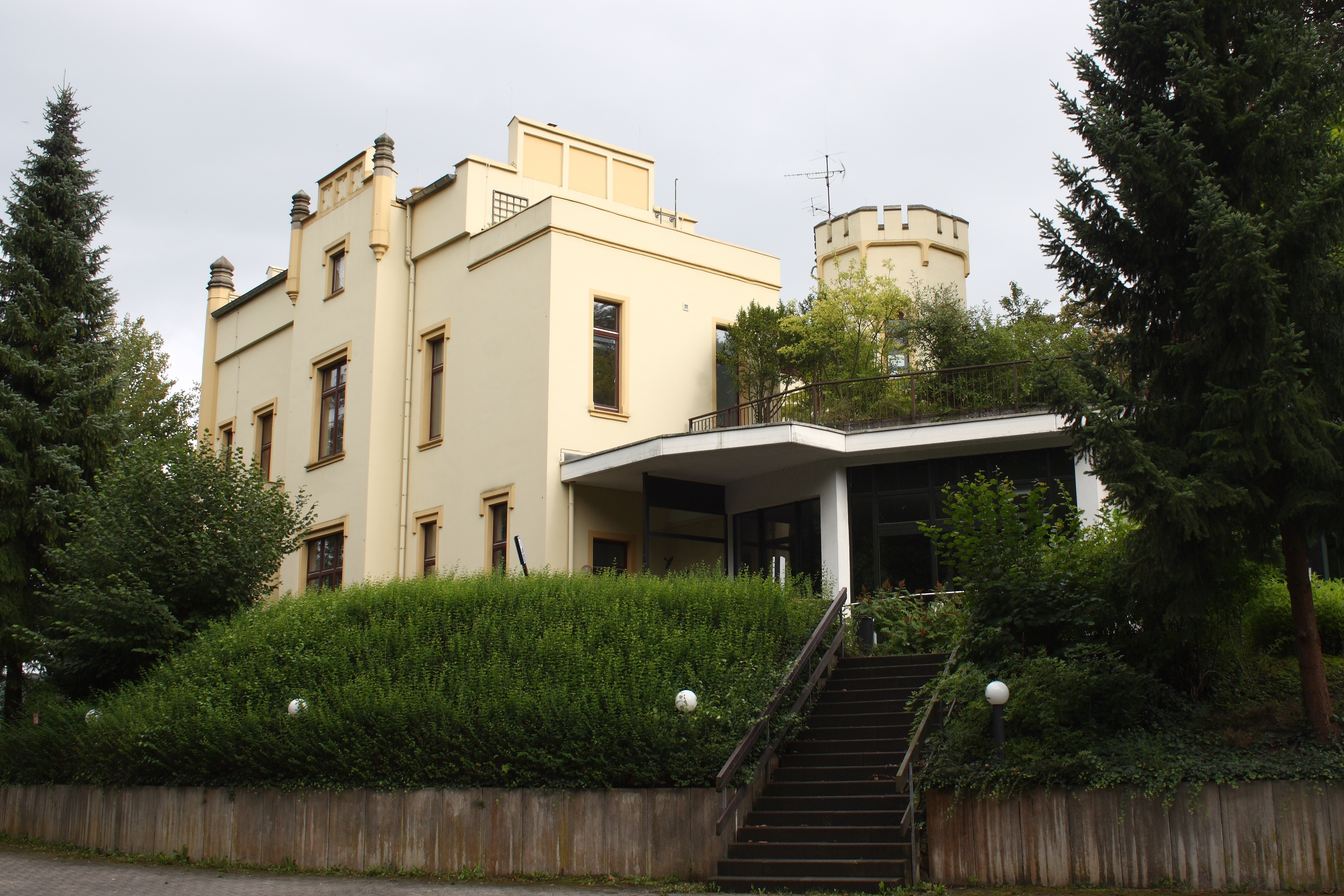 Haus Humboldtstein in Remagen im Landkreis Ahrweiler (Rheinland-Pfalz)